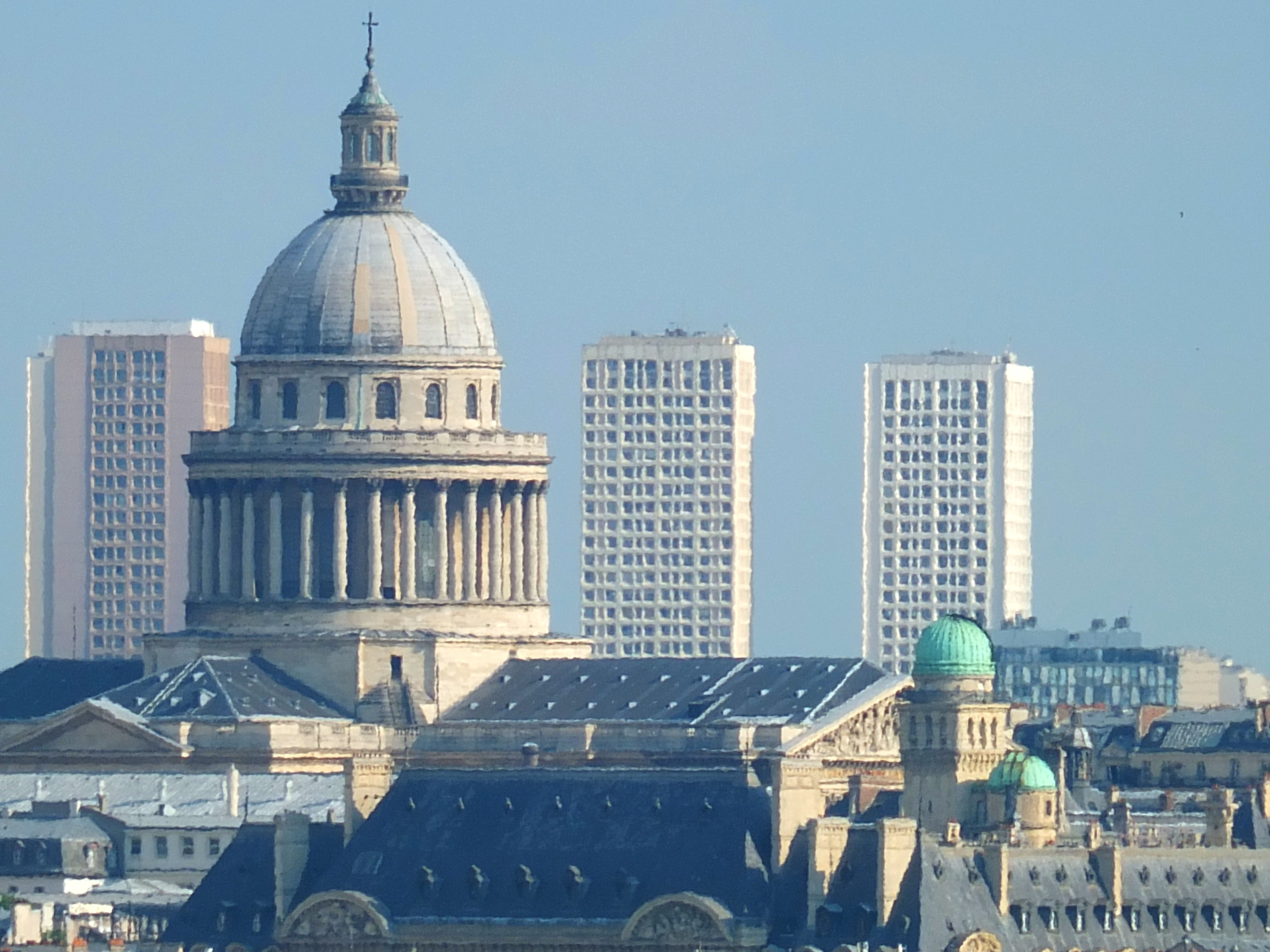 La coupole du Panthéon (Paris 6e arrond), distance 3,1 km. Vue au téléobjectif depuis la terrasse des Galeries Lafayette. Au premier plan observatoire de la Sorbonne, à l'arrière plan, les tours des Olympiades.